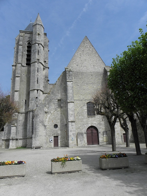 Abbatiale de la Trinité à Morigny-Champigny (91).